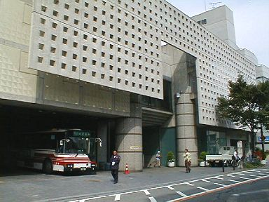 Kitazawa town hall in Setagaya, Tokyo